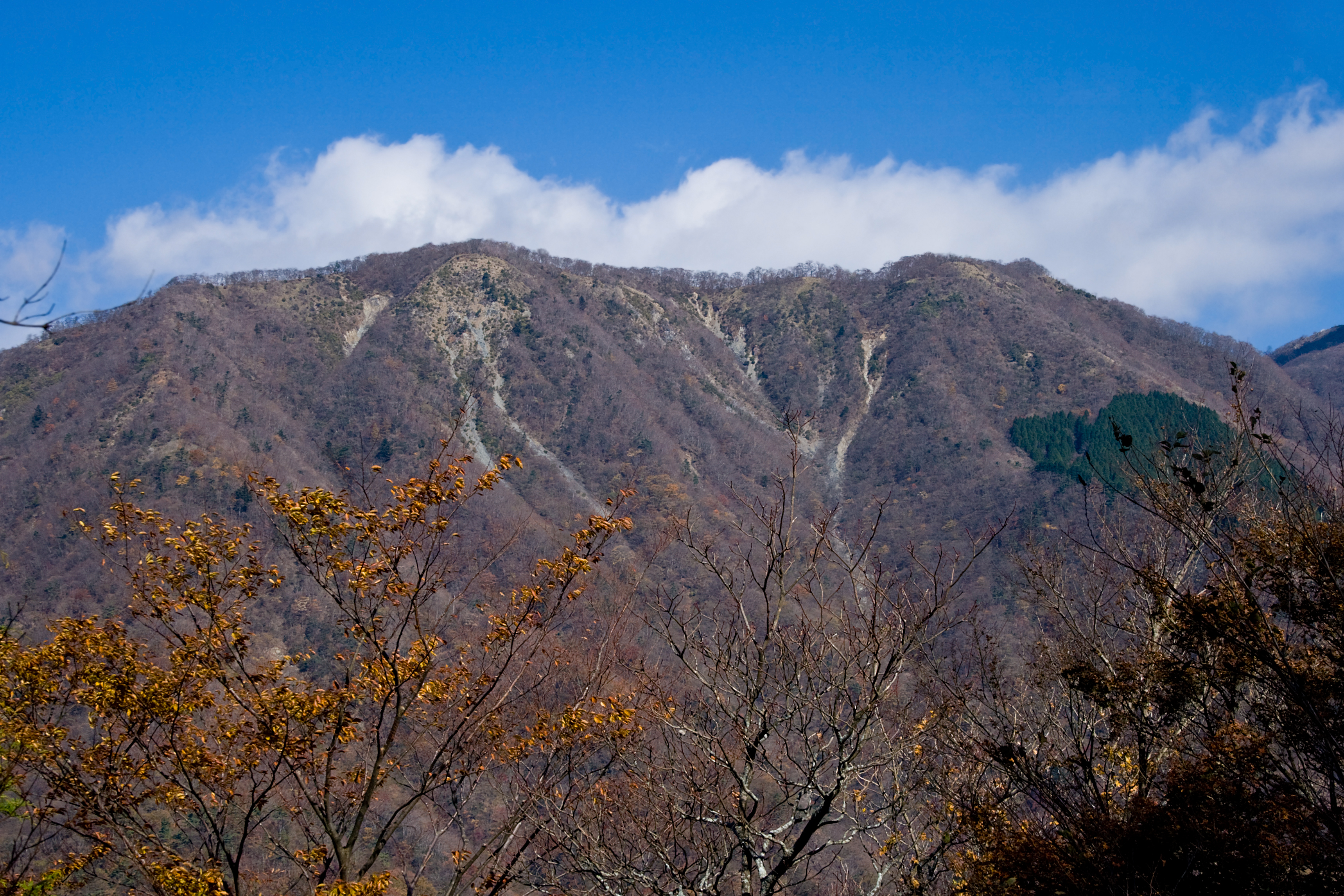 栗ノ木洞より望む小丸